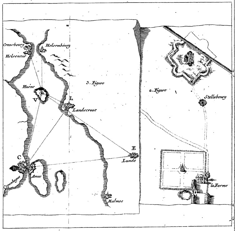 Triangulation de Picard autour d'Heven ; détails de l'île.